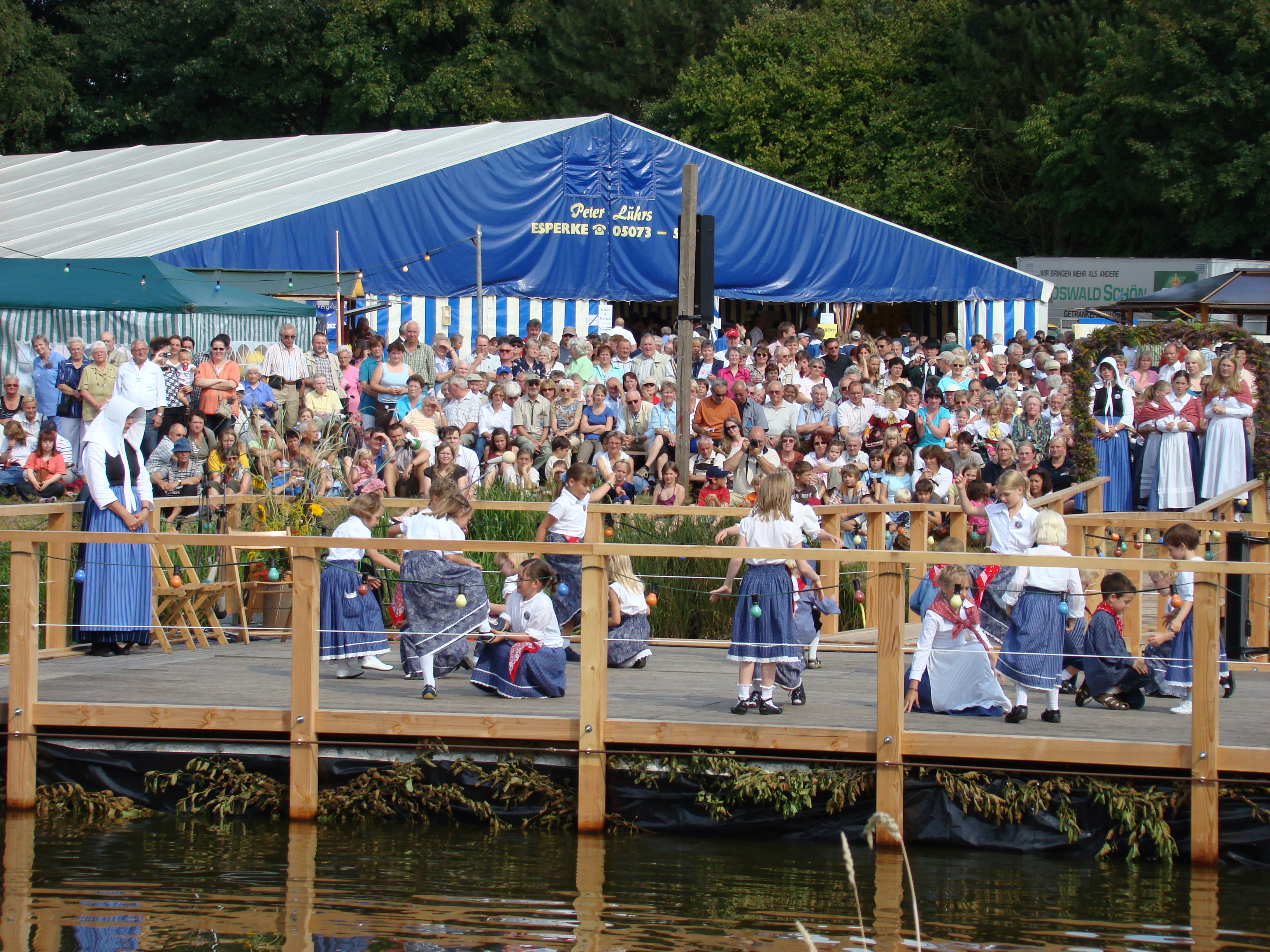 Kindergruppe auf der Wasserbühne beim Trachtenfest 2008 in Hermannsburg